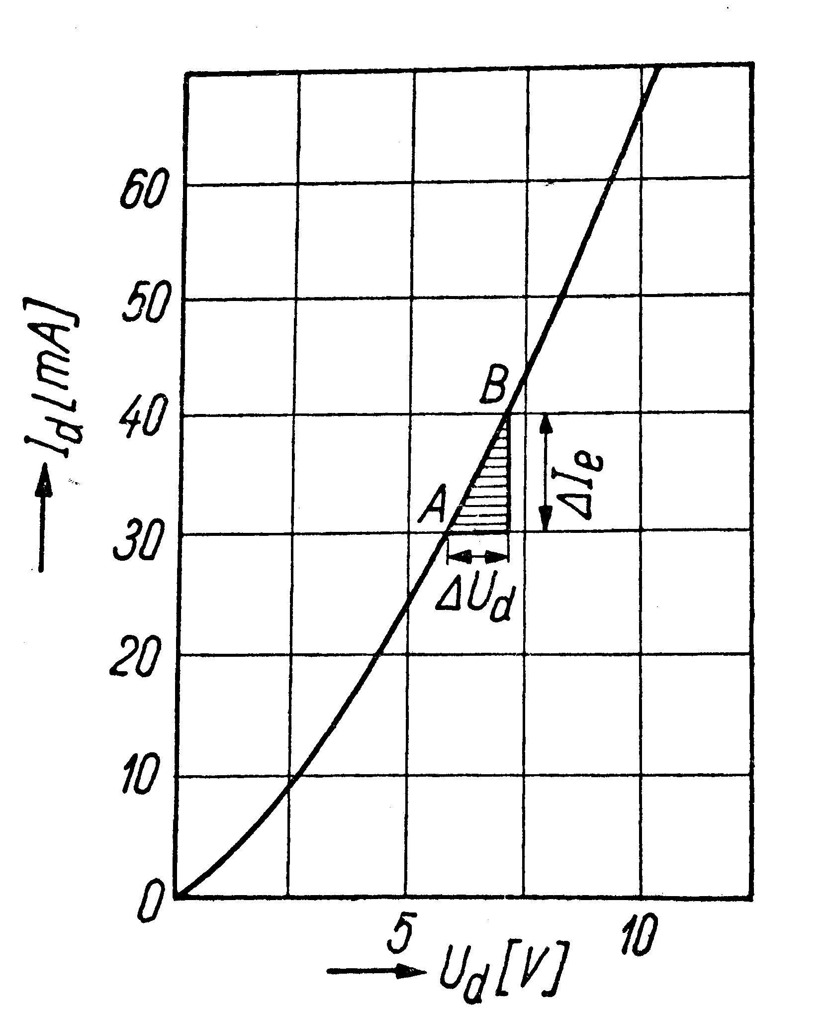 Převodní charakteristika diody, zjištění její strmosti